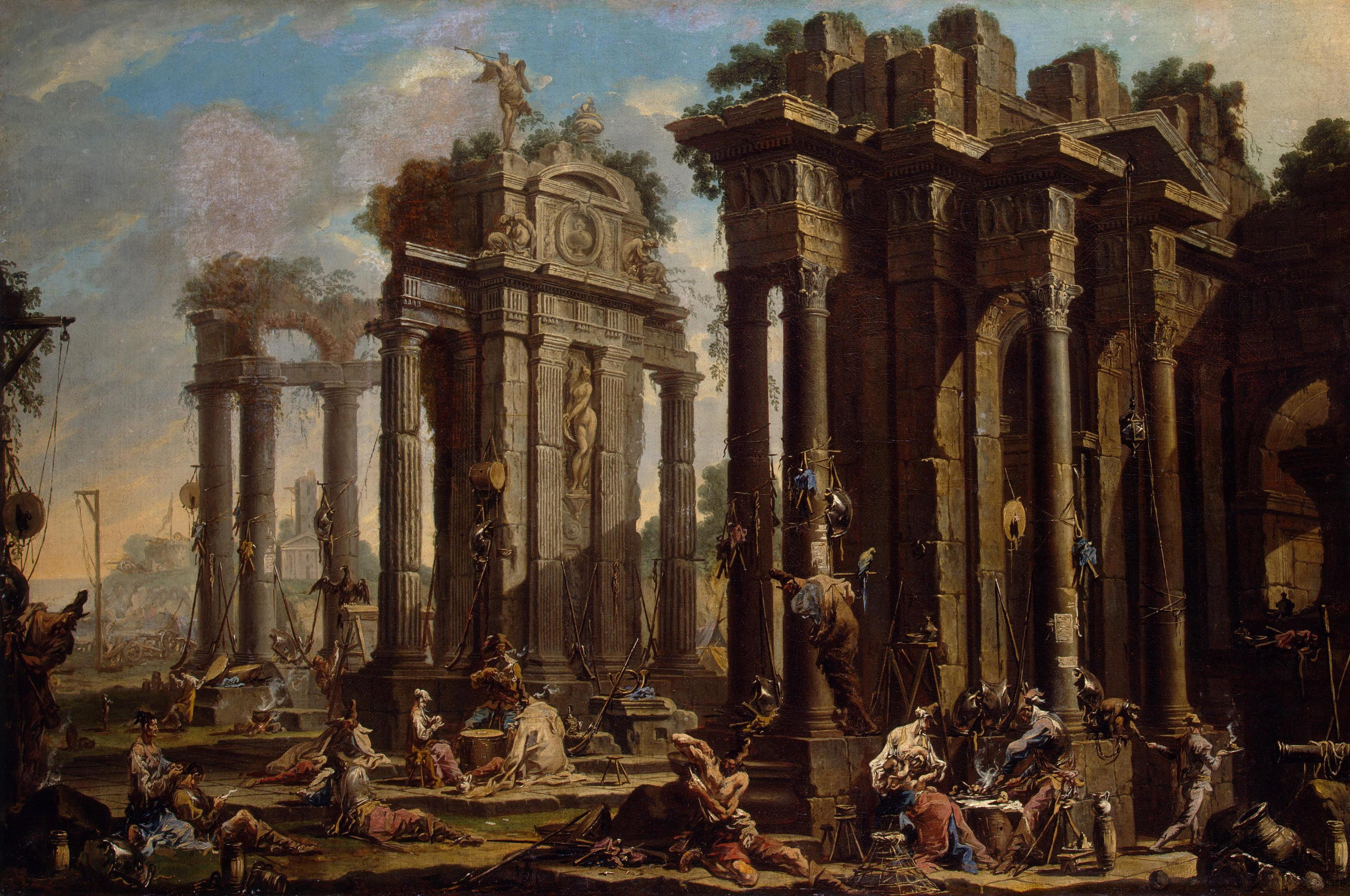 Trinkgelage von Banditen mit Waffen in Ruinenarchitektur